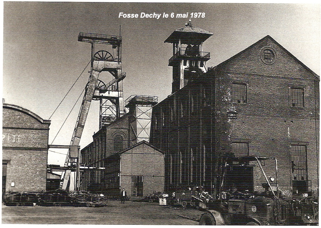 Fosse de Dechy à Dechy aujourd'hui disparue